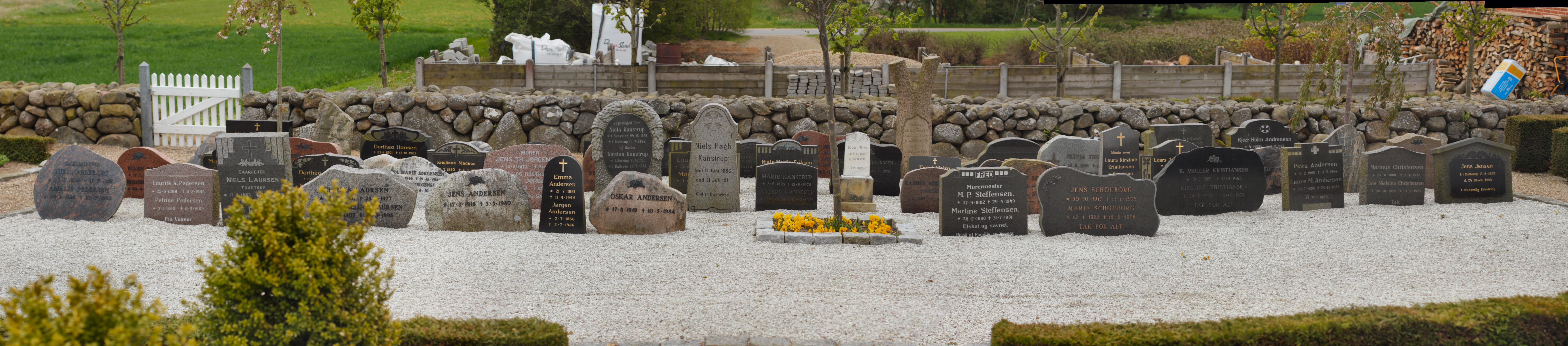 Lapidarium på dallerup kirkegård